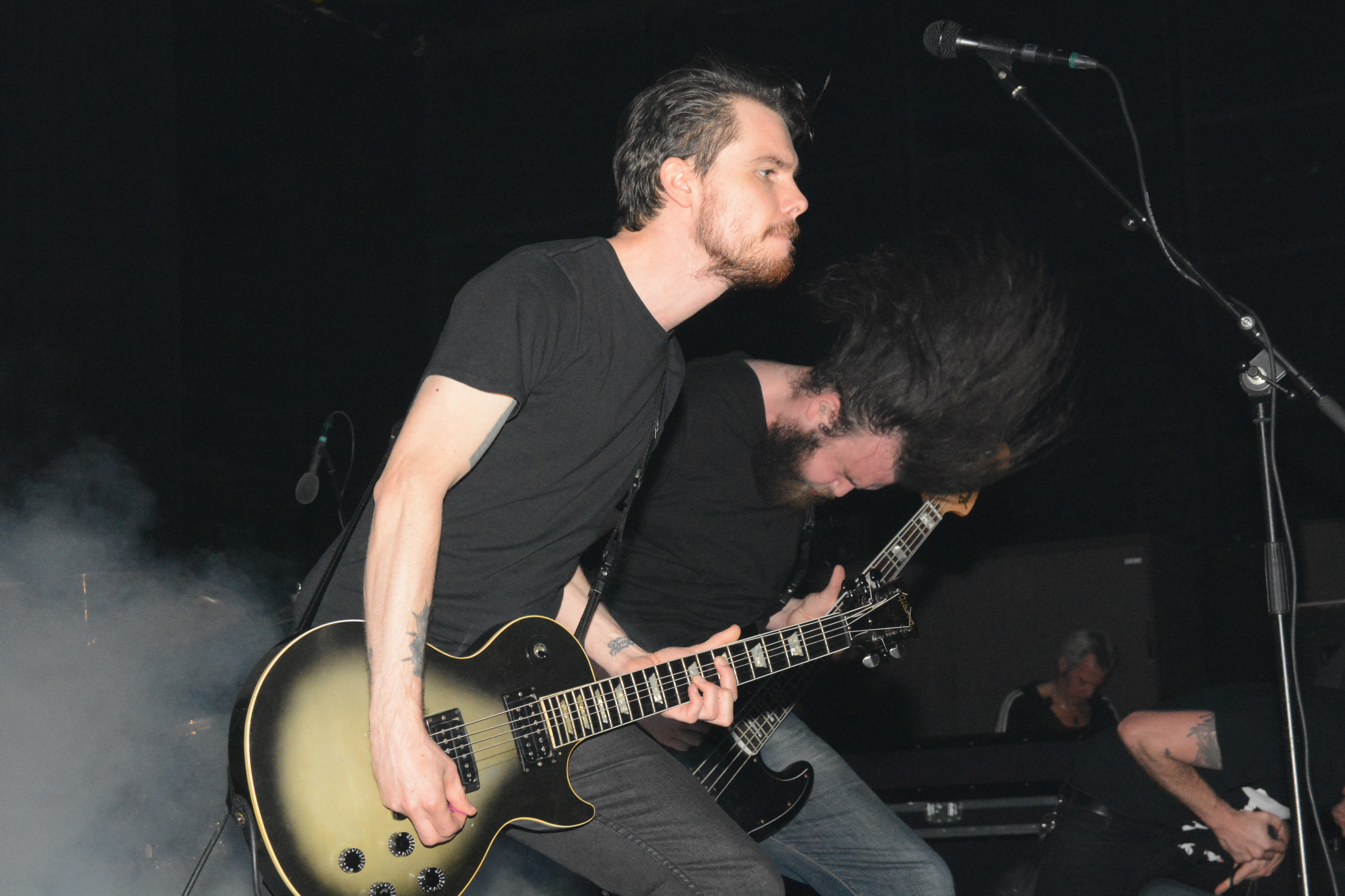 Aufgenommen am 1. November 2013